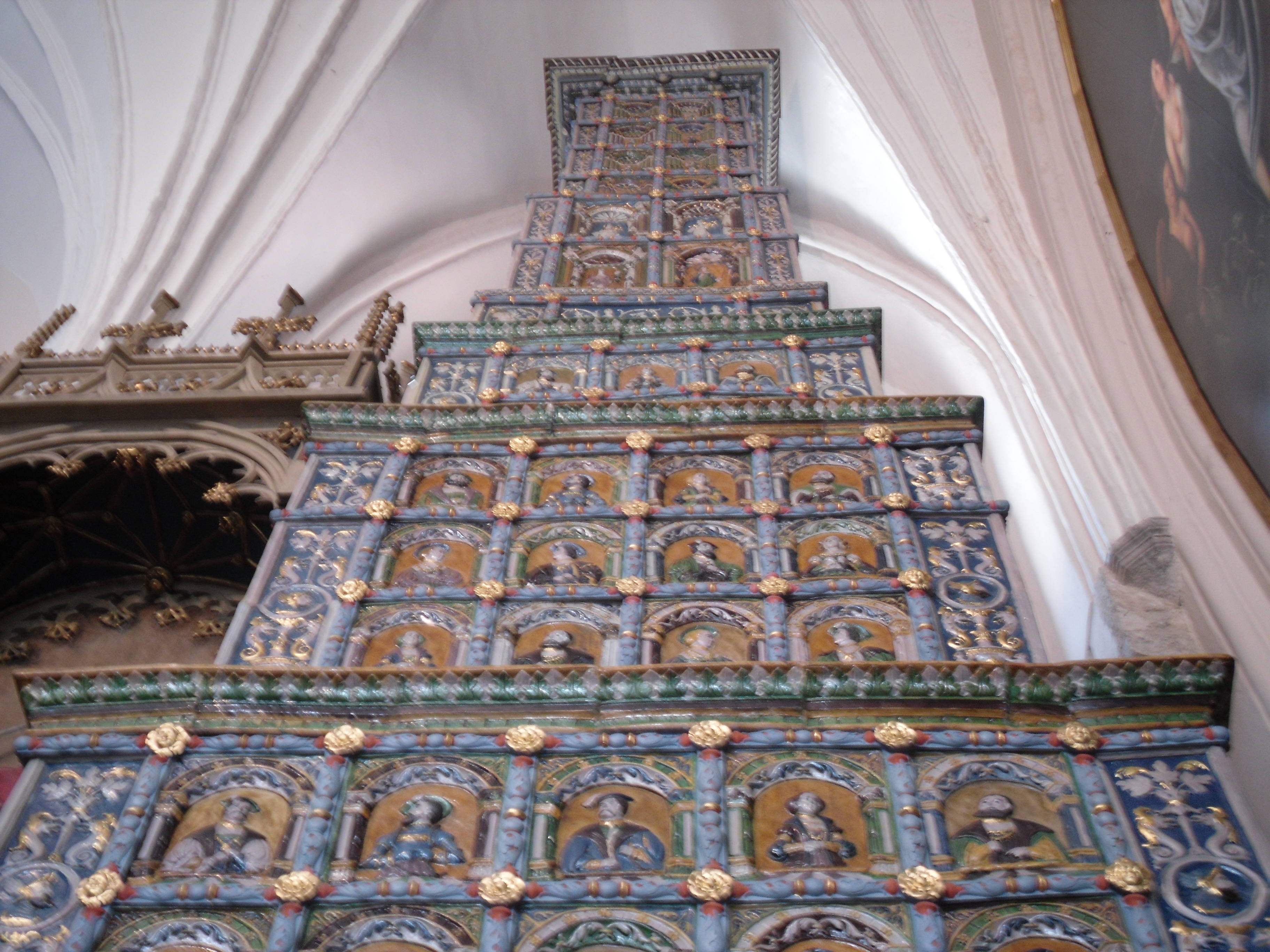 Piec z Dworu Artusa w Gdańsku.